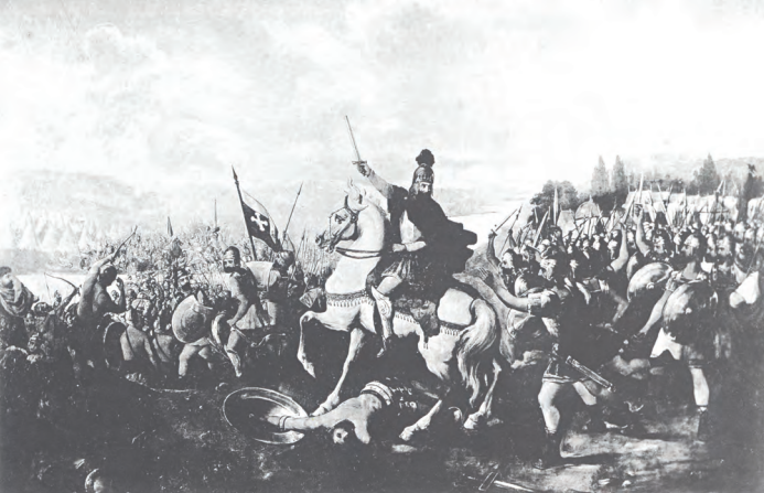 «Վարդան Մամիկոնյանը Ավարայրի ճակատամարտում», անհայտ հեղինակ